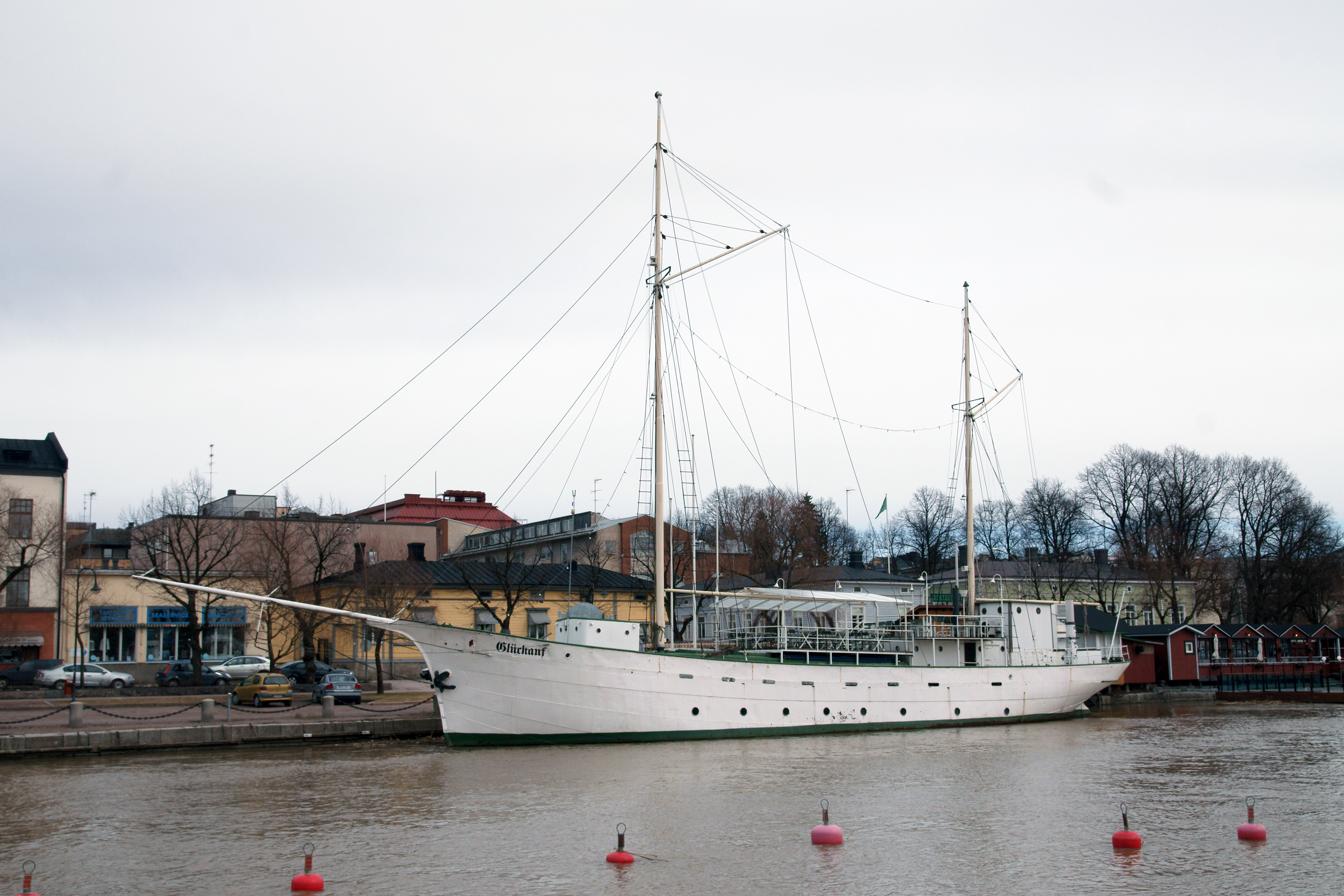 Ravintolalaiva Glückauf Porvoossa.